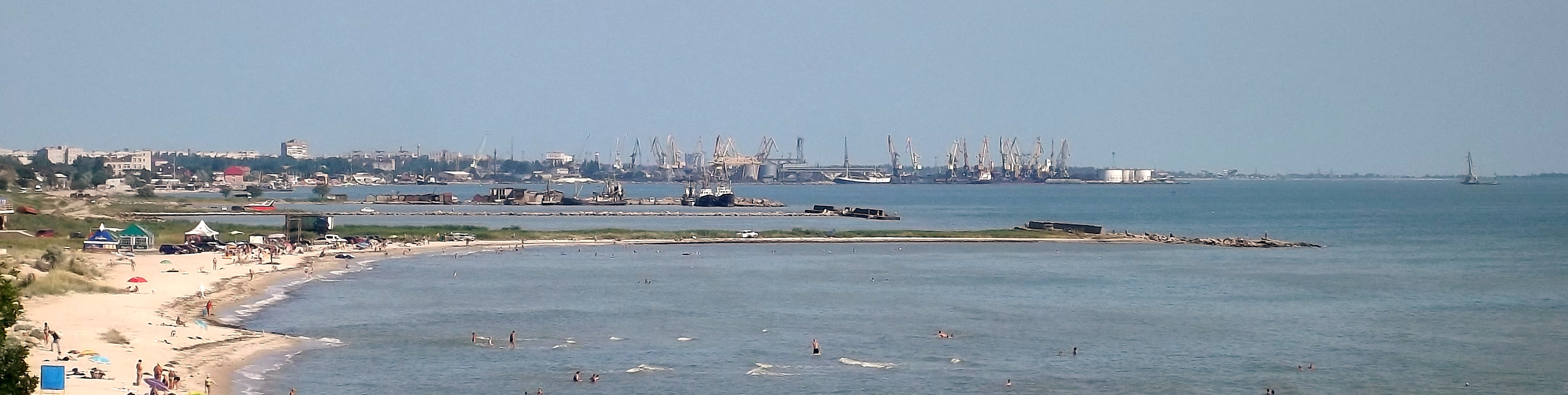 фото в районе АКЗ